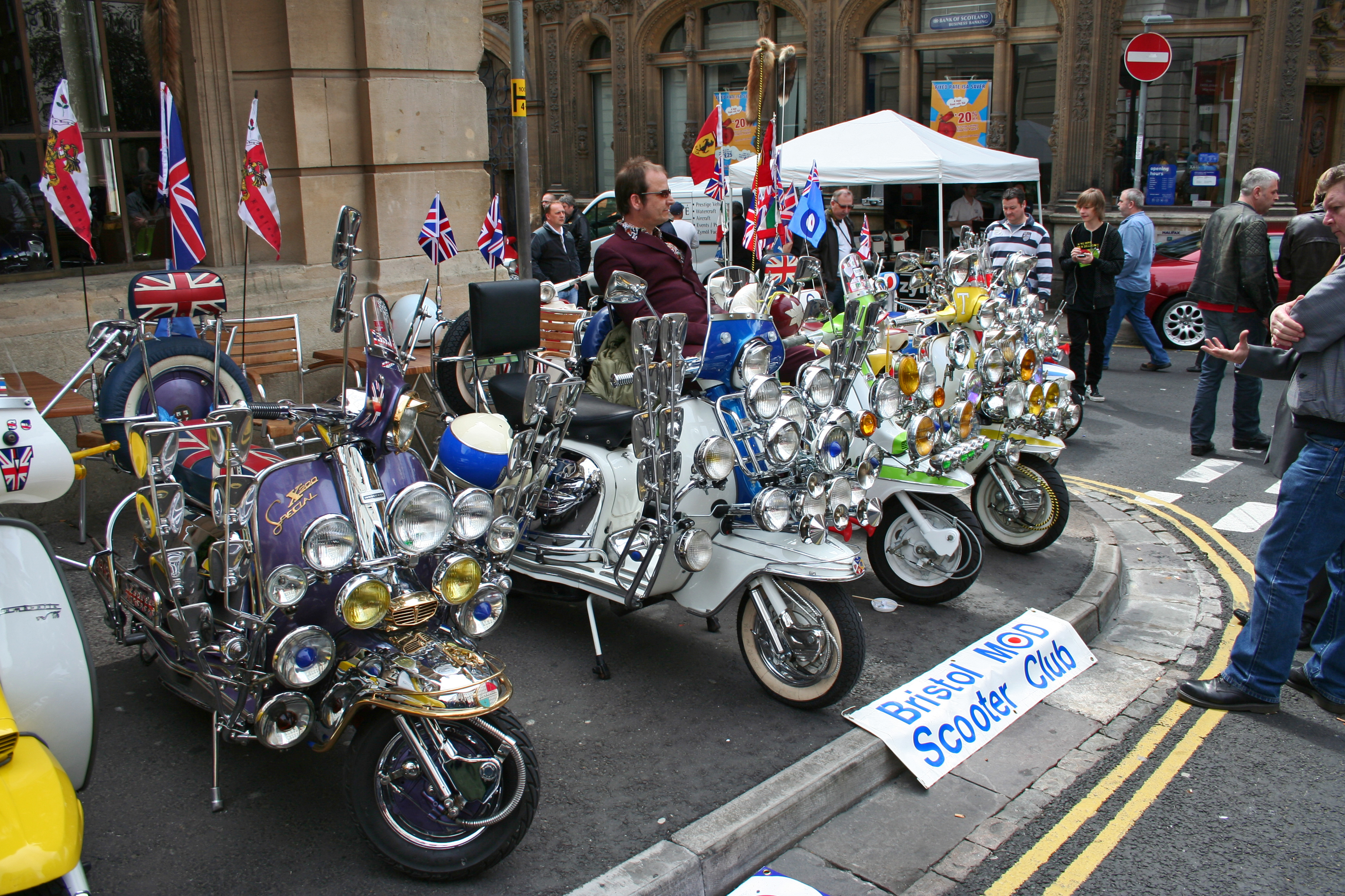 Bristol Italian Auto Moto Festival 2008